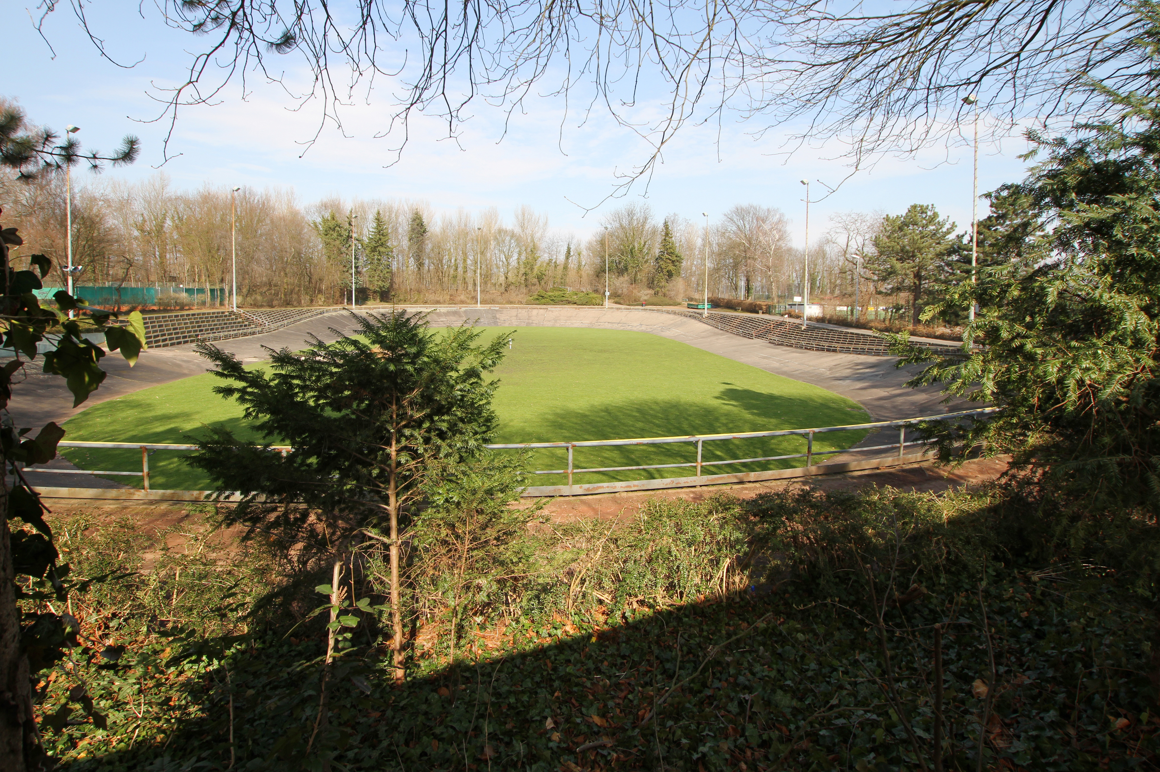 Alt-Hürth, ehemalige Radrennbahn